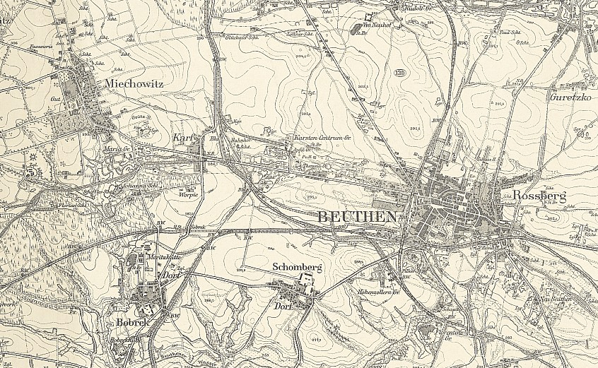 Ausschnitt aus dem Messtischblatt Nr. 5679 (ex 3309) (Beuthen), 1:25.000